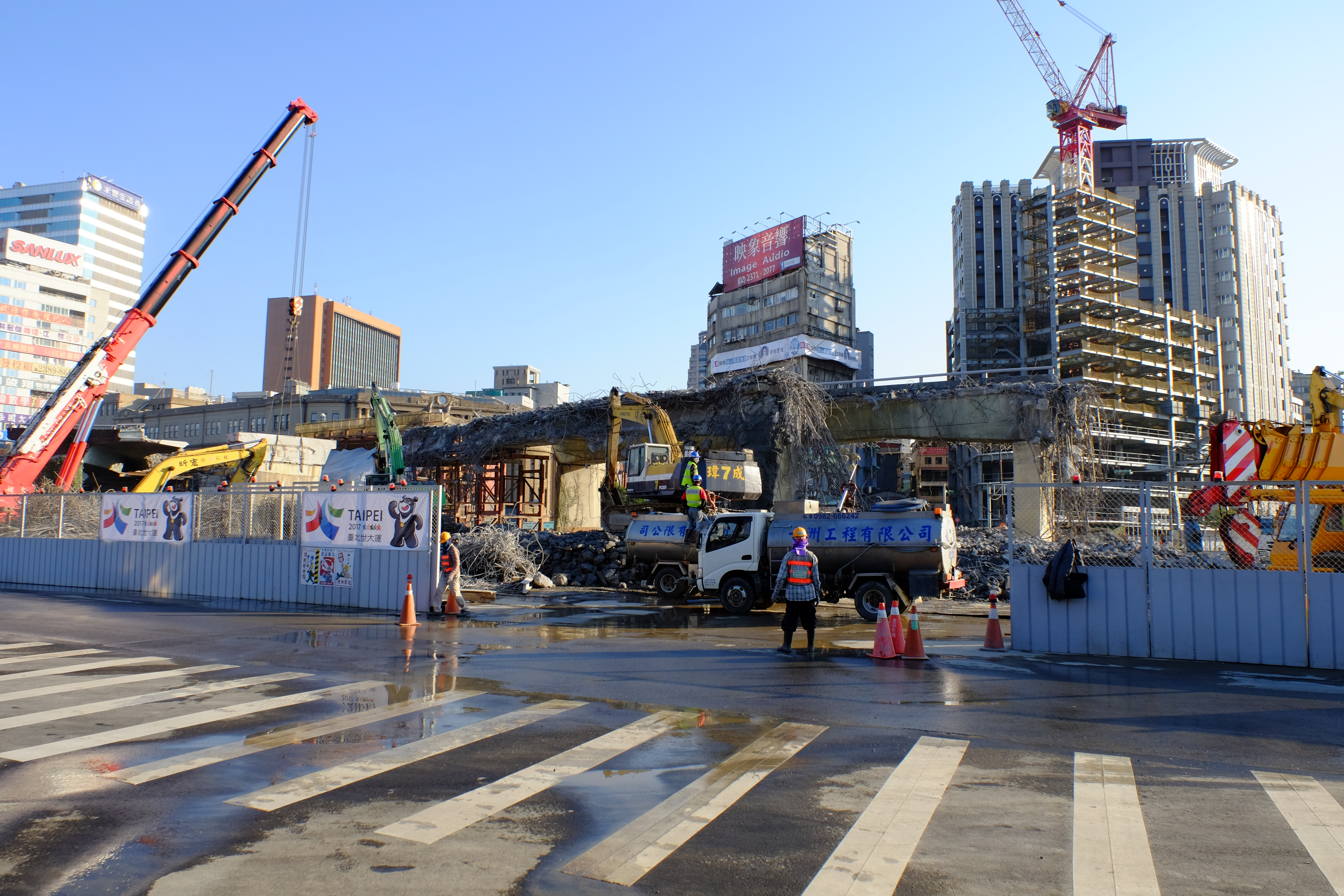 臺北市忠孝橋北門引道拆除工程第三日，從忠孝西路二段與延平北路一段路口安全島南望工地車輛出入口。